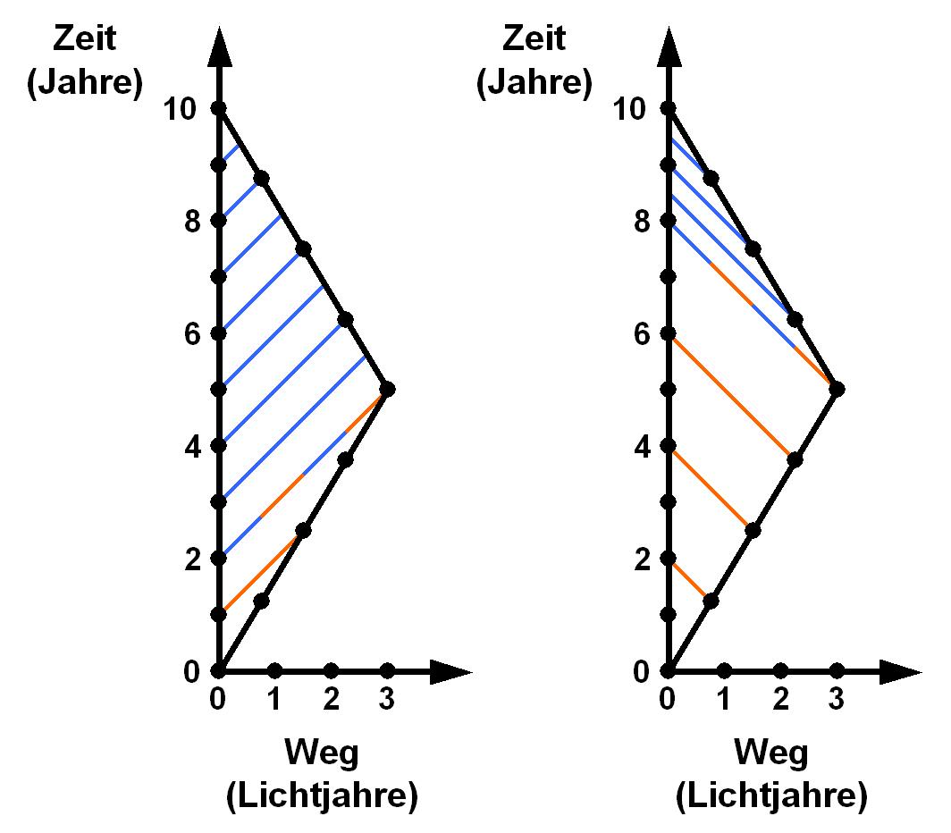 Weg-Zeit-Diagramme von Lichtwegen zum Zwillingsparadoxon für eine Reise mit 60% der Lichtgeschwindigkeit.